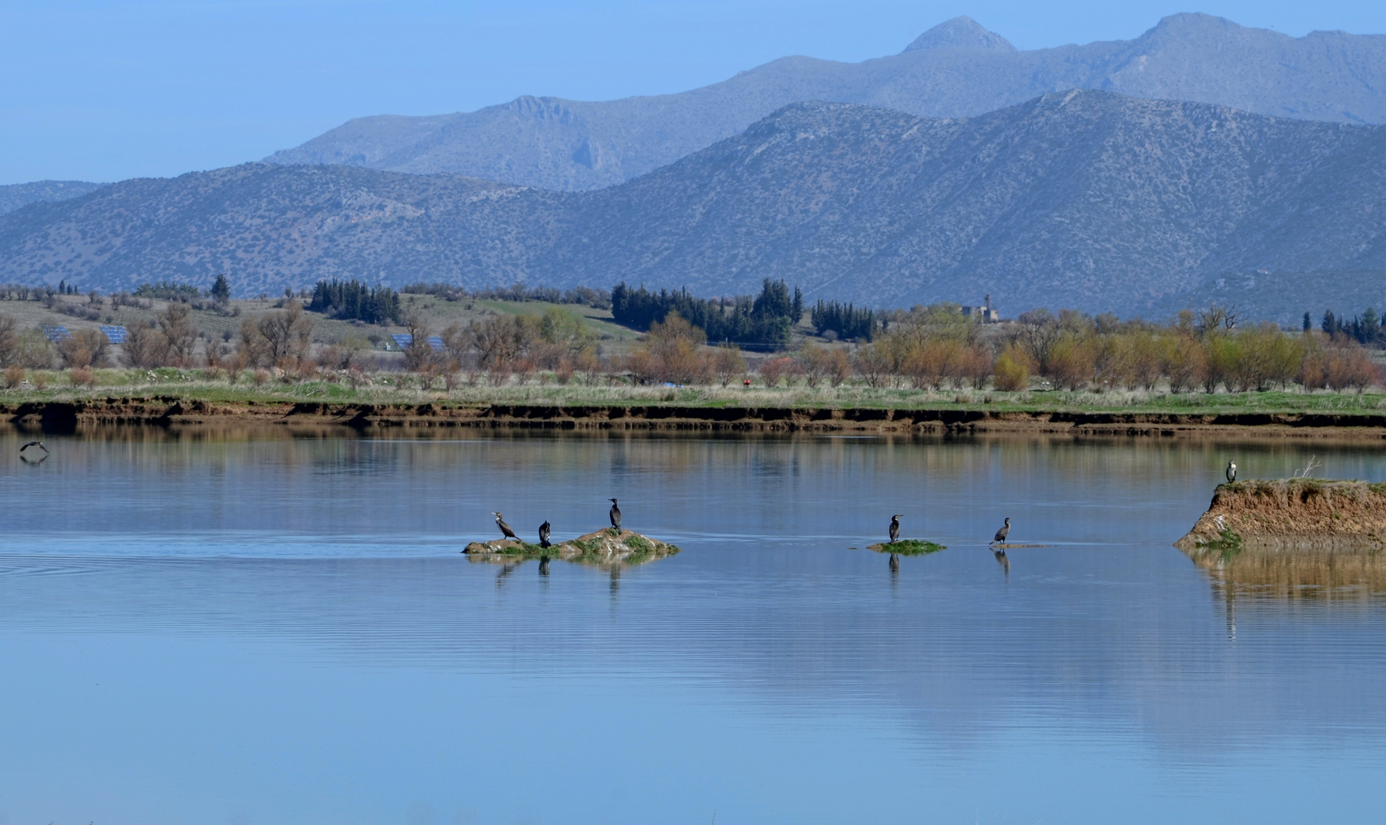 Μαγικό τοπίο με θέα τους κορμοράνους στην Τάκα This is a photography of Natura 2000 protected area with ID GR2520002